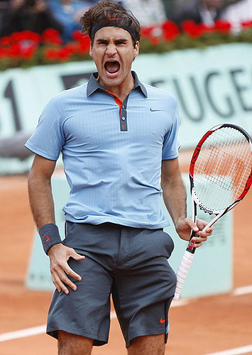 Roger Federer - Roland Garros 2009. El suizo Roger Federer sufrió sobremanera para remontar y eliminar al argentino Juan Martín del Potro, número 5 del mundo, en cinco sets por 3-6, 7-6 (2), 2-6, 6-1 y 6-4 en las semifinales de Roland Garros.